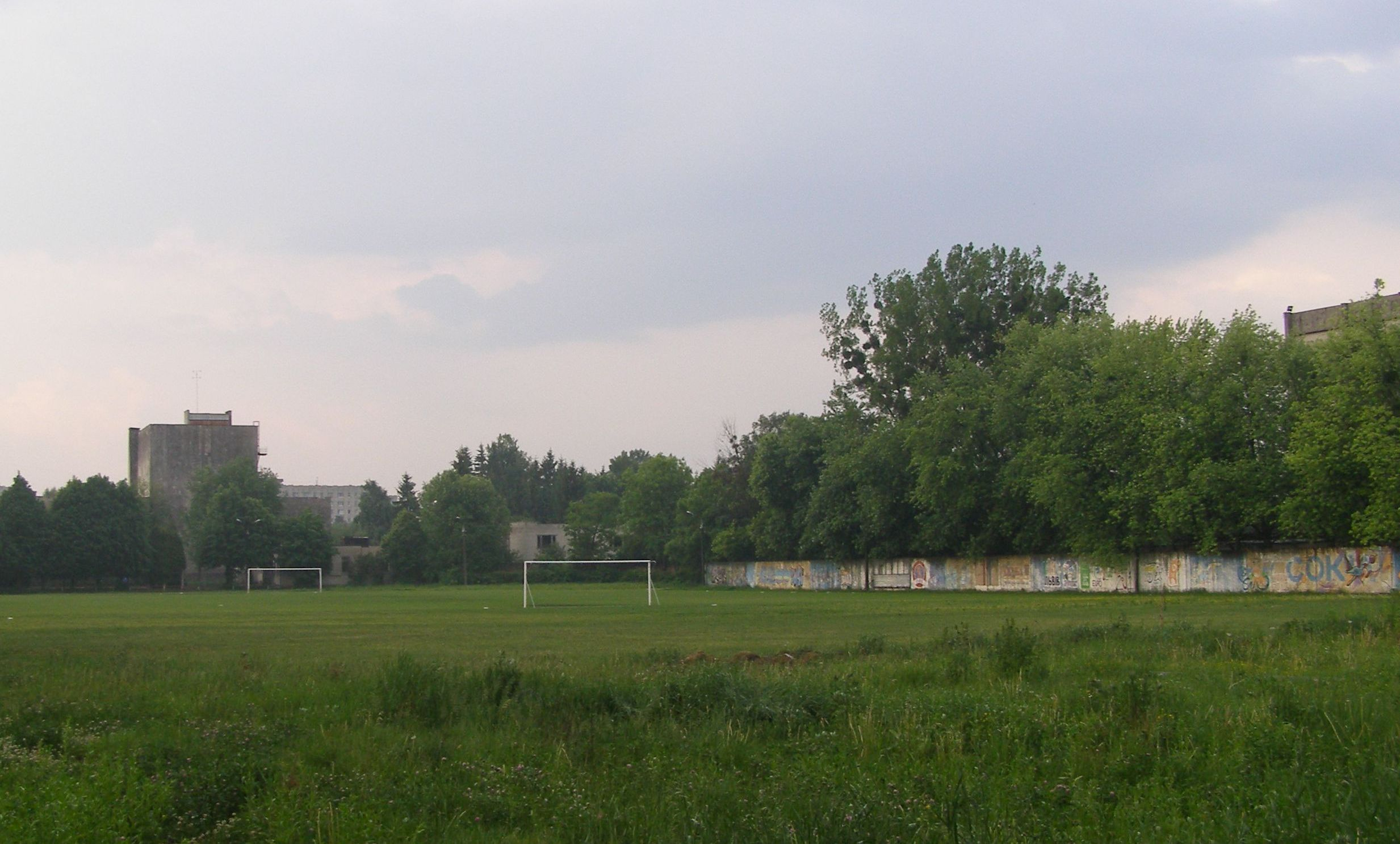 Sokil-Stadion in Lwiw